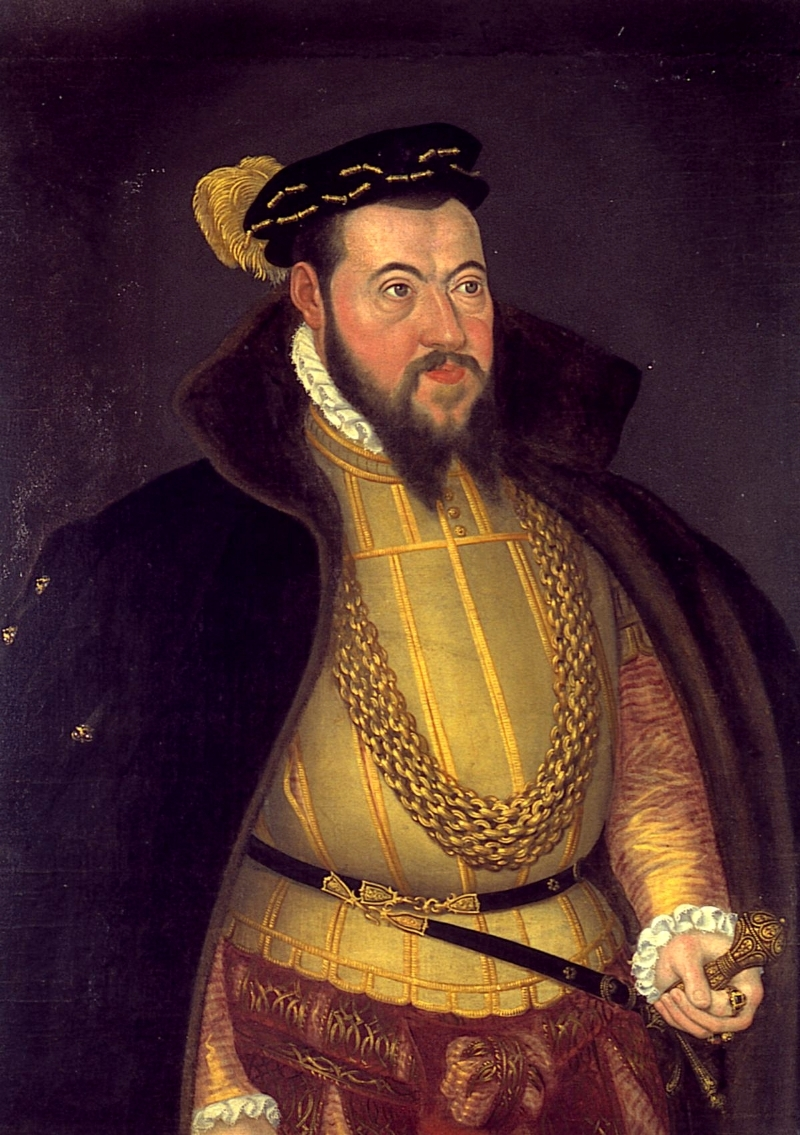 Person: Wolfgang, Herzog von Zweibrücken und Pfalz-Neuburg, * 26. 9. 1526 in Zweibrücken, † 11. 6. 1569 in Nessun bei Limoges, Grabstätte in der Pfarrkirche von Meisenheim (bei Koblenz) Maler: unbekannt (Deutsch, 16. Jahrhundert)